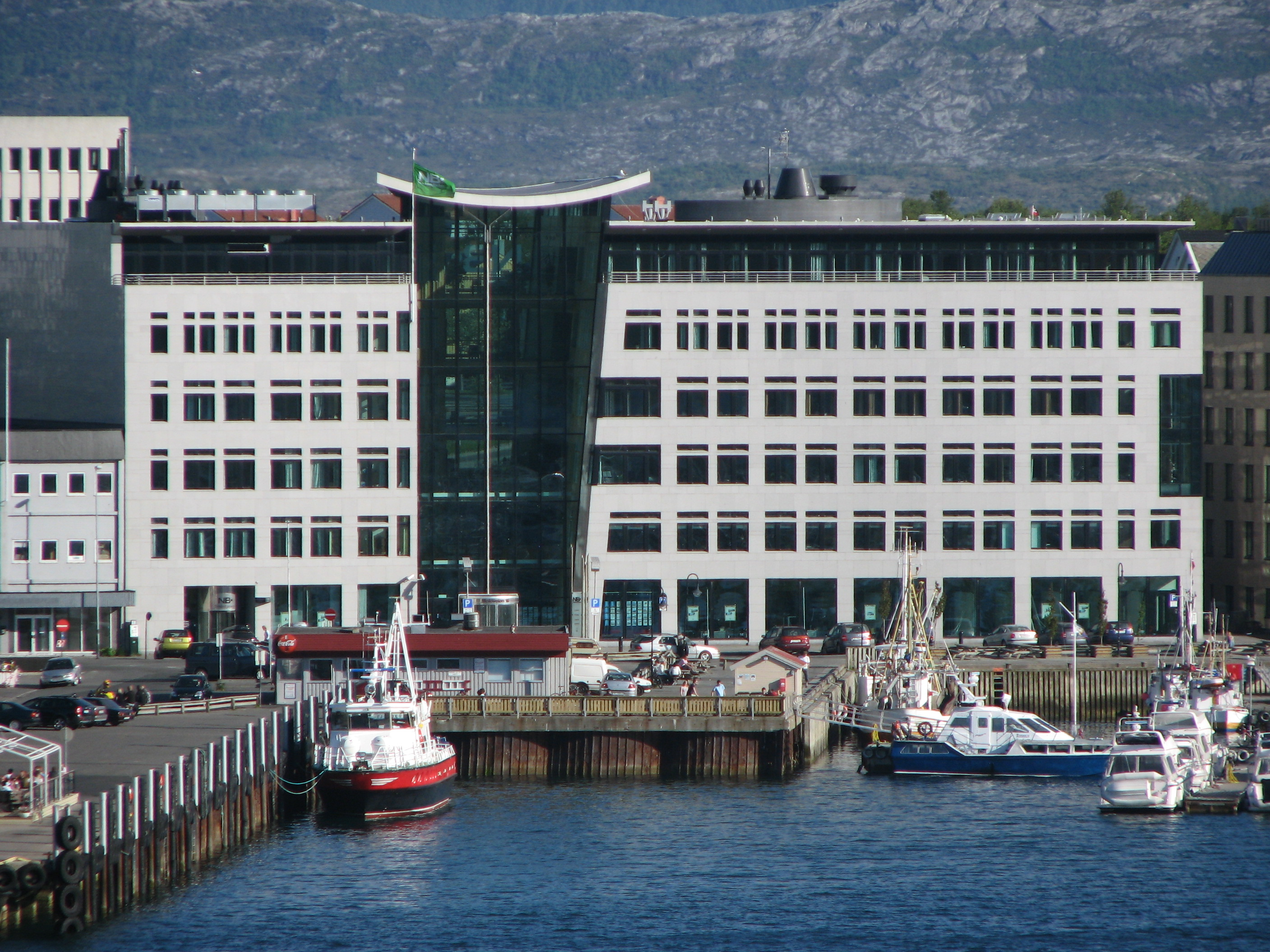 Moloveien 16, Bodø, Nordlandsbankens hovedkontor